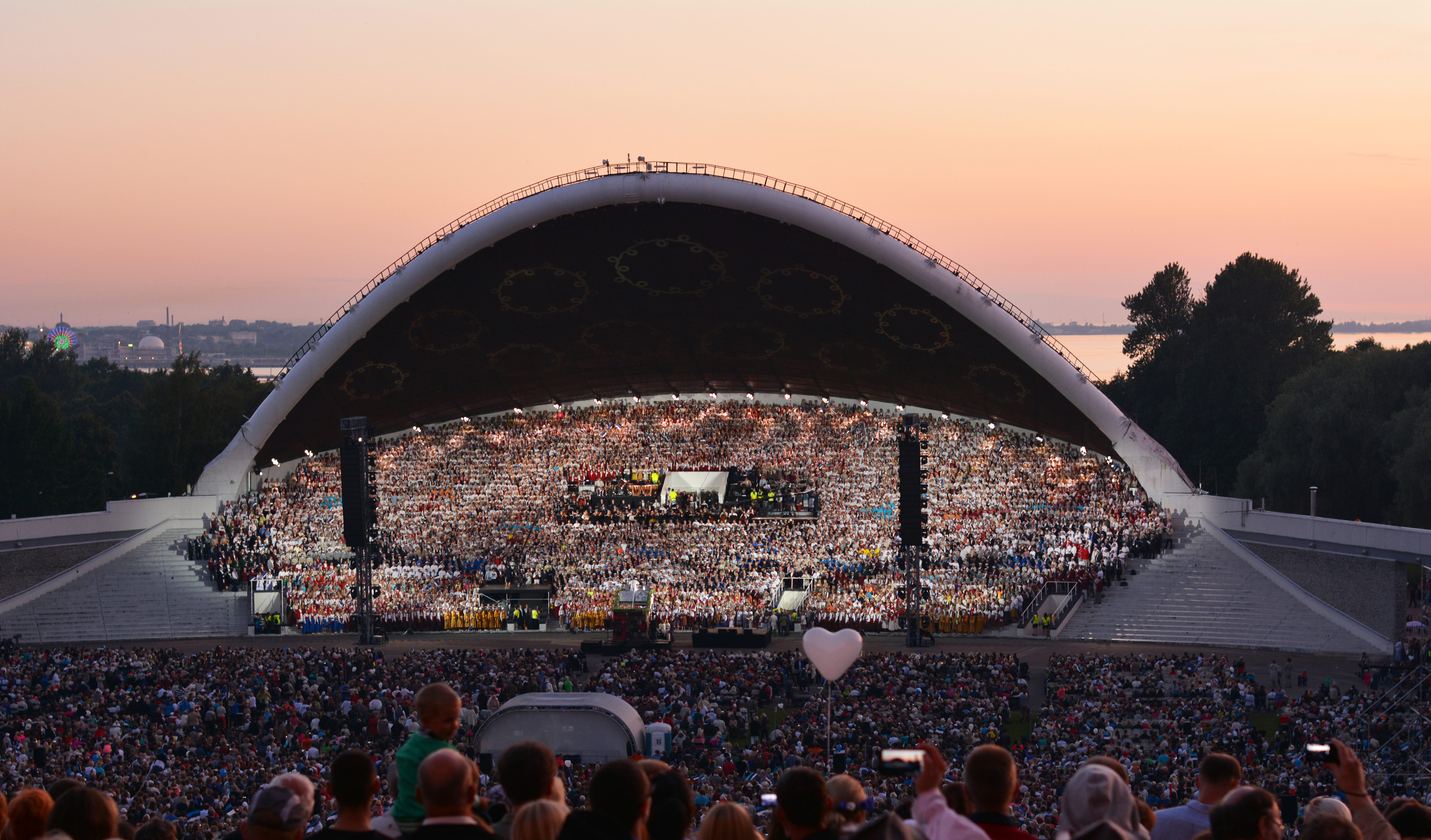 Tallinna laululava ansambel, 1960.a.(XXVI laulupidu 2014a.)